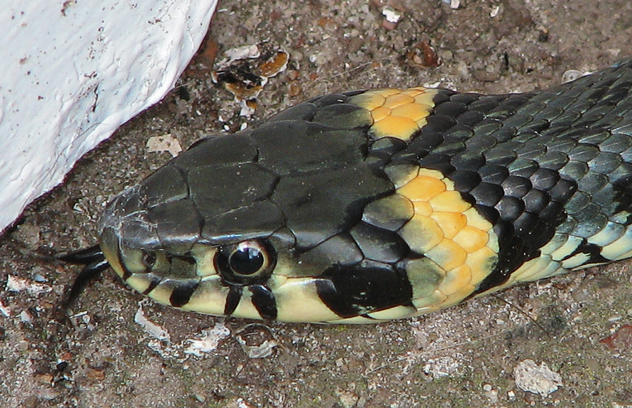 Beschreibung: Kopf einer Ringelnatter (Natrix natrix) Fotograf: Darkone, 26. Juli 2005